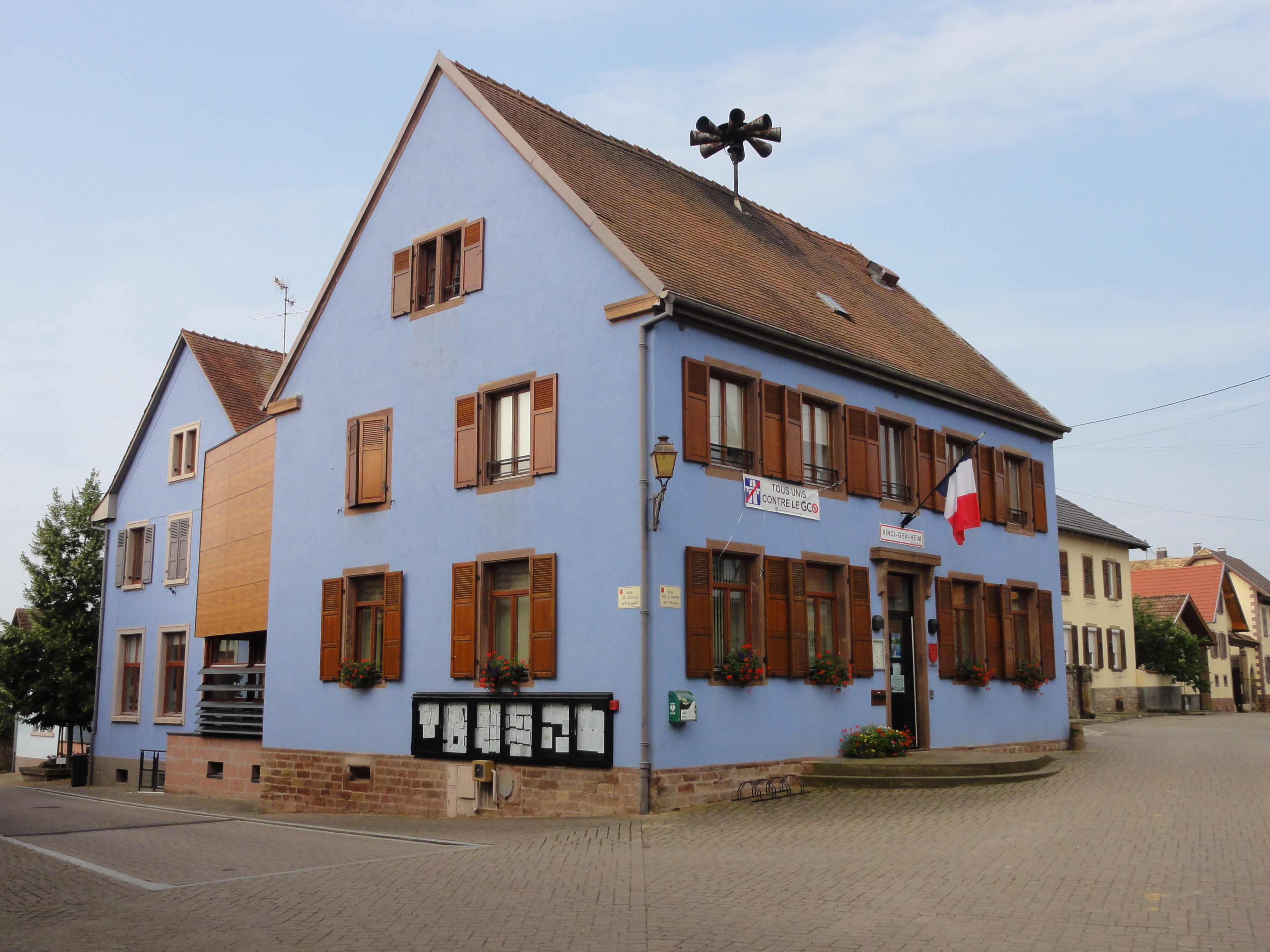 Alsace, Bas-Rhin, Griesheim-sur-Souffel, Mairie-école (XIXe), 1 rue de la Mairie. .